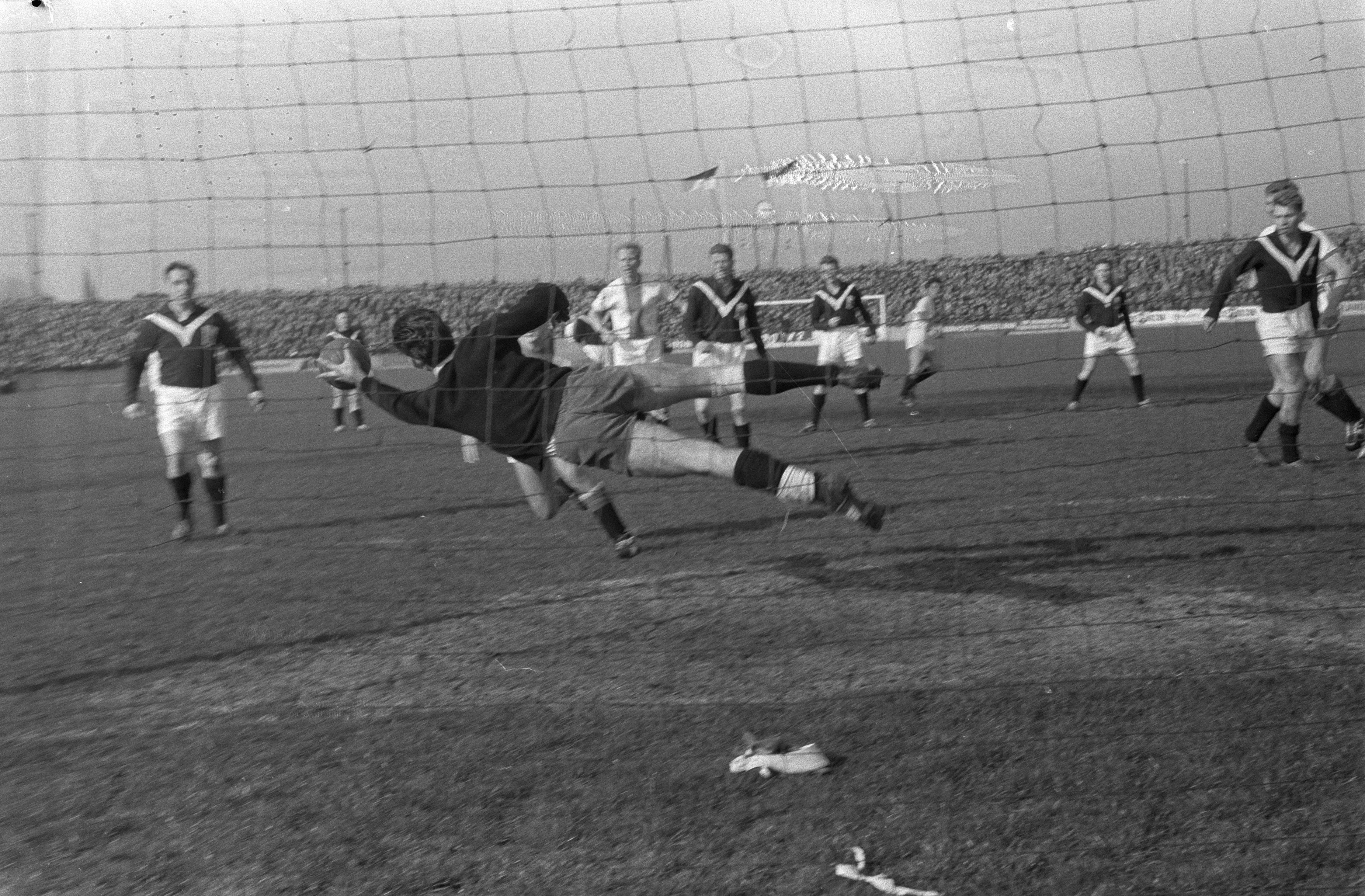 Collectie / Archief : Fotocollectie Anefo Reportage / Serie : [ onbekend ] Beschrijving : Enschede tegen Ajax 3-3, v.l.n.r. Odenthal, keeper Nijhui Abe en Henk Groot Datum : 6 maart 1960 Locatie : Enschede Trefwoorden : keepers Persoonsnaam : Abe, Groot, Henk Fotograaf : Pot, Harry / Anefo Auteursrechthebbende : Nationaal Archief Materiaalsoort : Negatief (zwart/wit) Nummer archiefinventaris : bekijk toegang 2.24.01.05 Bestanddeelnummer : 911-0710